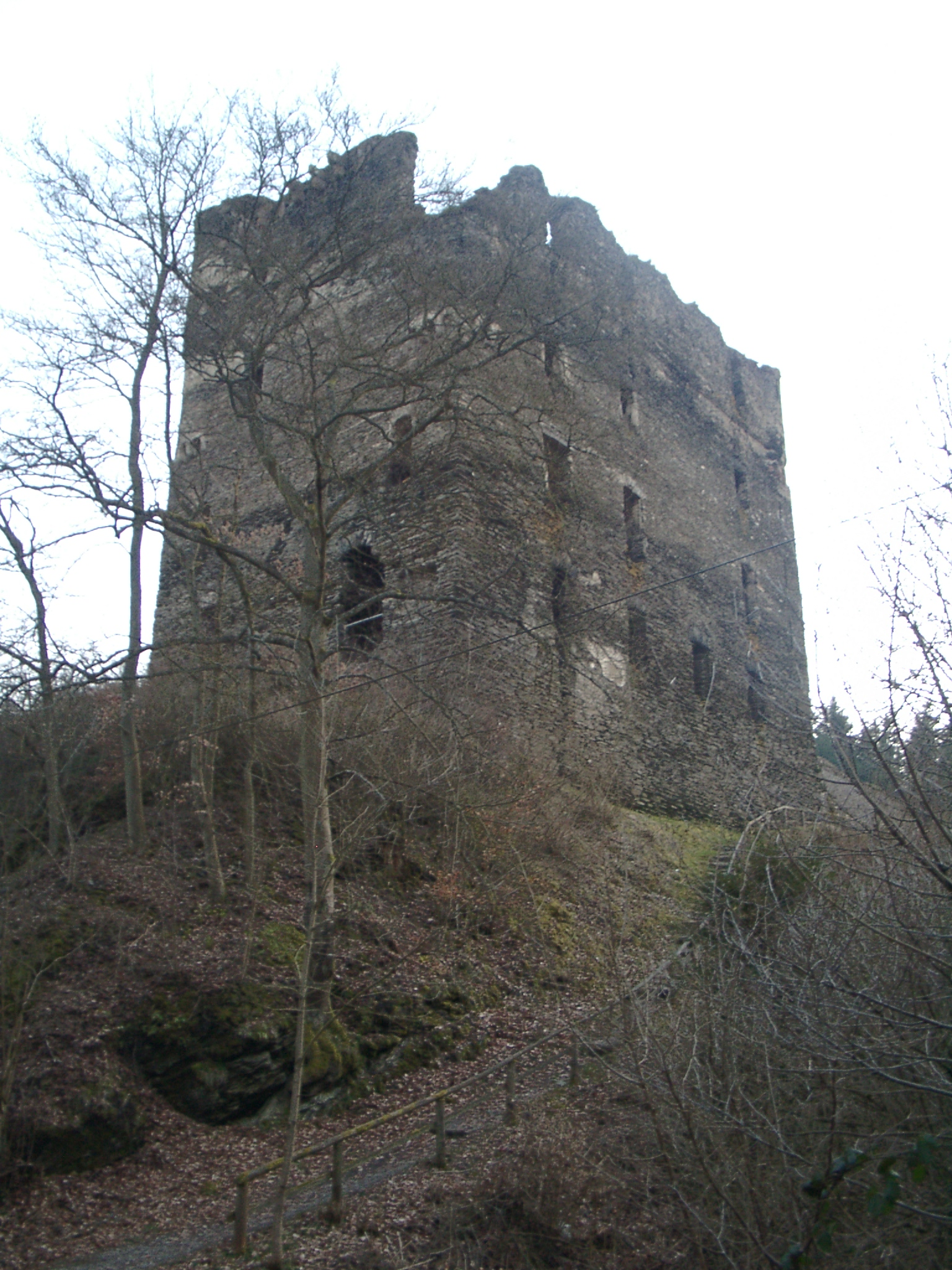 Burg Balduinseck